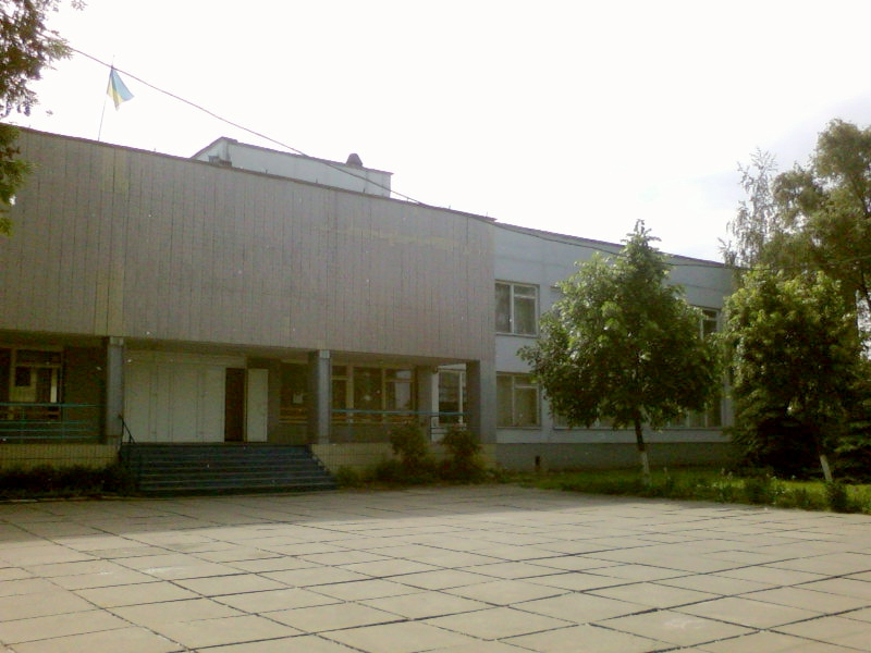 Школа №243